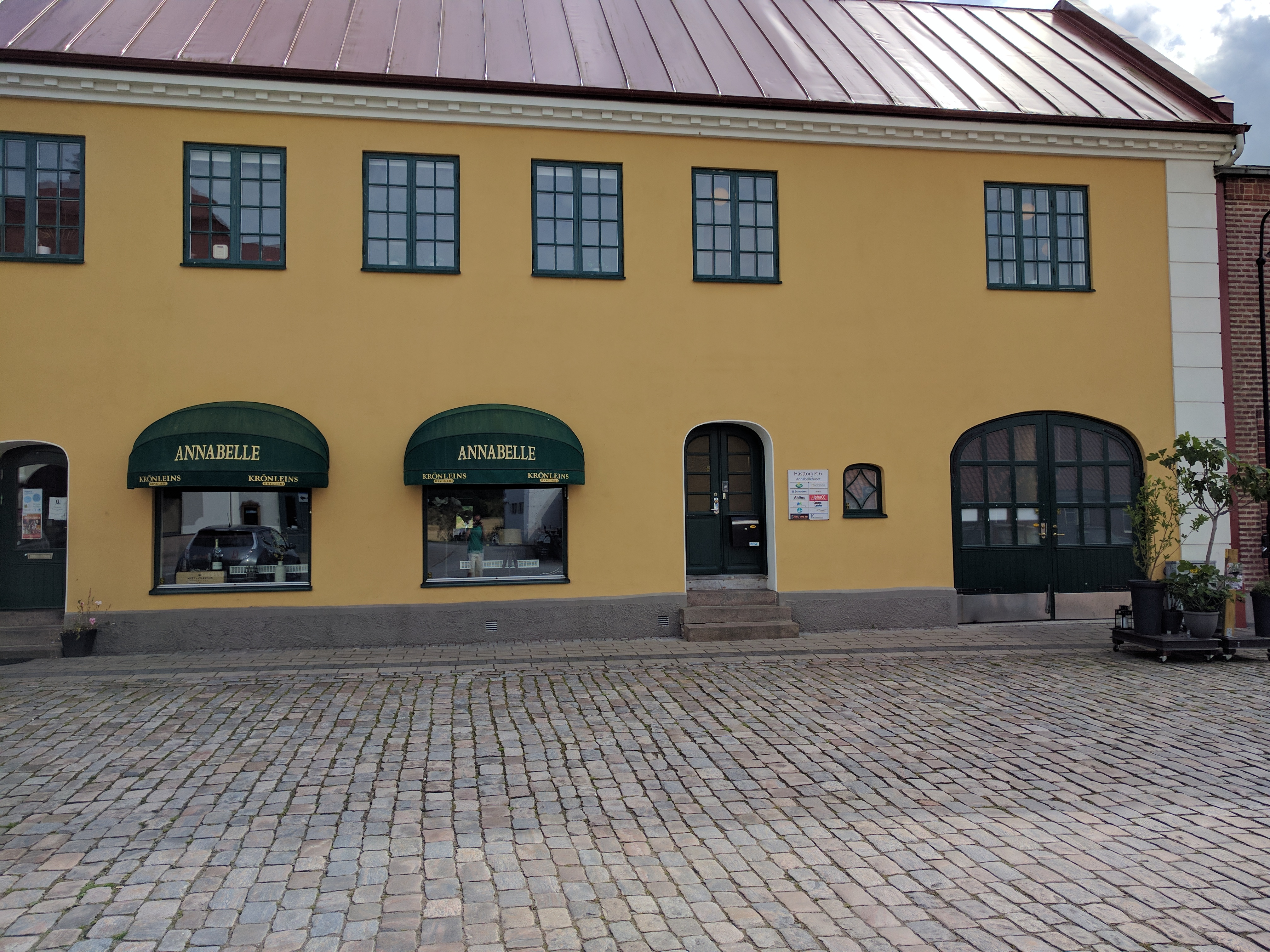 Nore Norolds före detta studio på Hästtorget 6 i Laholm.